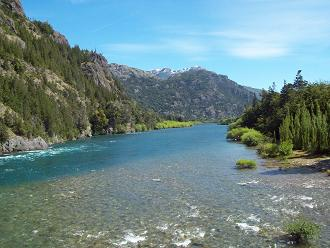 Río Futeleufú hacia el límite con Chile, muy cerca del mismo.